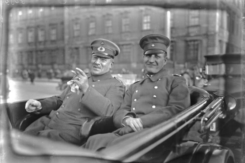 Generalmajor Severin der Stadtkommandant von Berlin tritt am 1. April von seinem Posten zurück! Neueste Aufnahme des Generalmajors Severin, welcher zurücktreten wird.